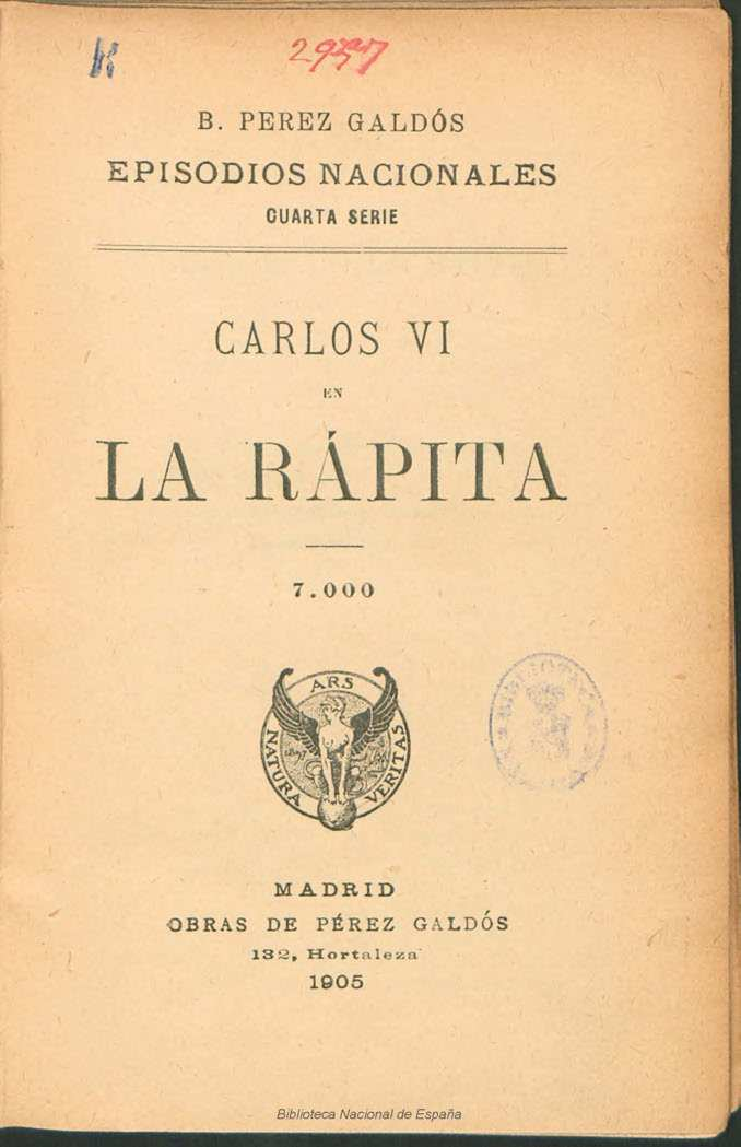 Carlos VI en La Rápita Autor: Pérez Galdós, Benito (1843-1920) Fecha: 1905 Datos de edición: Madrid, Obras de Pérez Galdós, Est. Tip. de la Viuda e Hijos de Tello